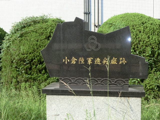 北九州市にあった小倉造兵廠の跡の碑です。